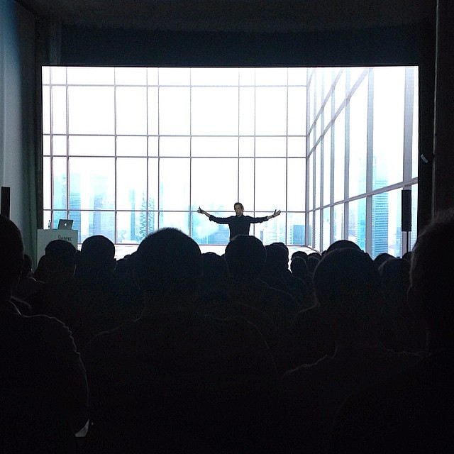 Костя Горский рассказывает о новом браузере от Яндекса